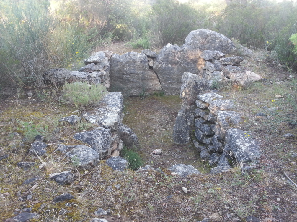 Dolmen des Adrets (no 3), (Inscrit, 1988)